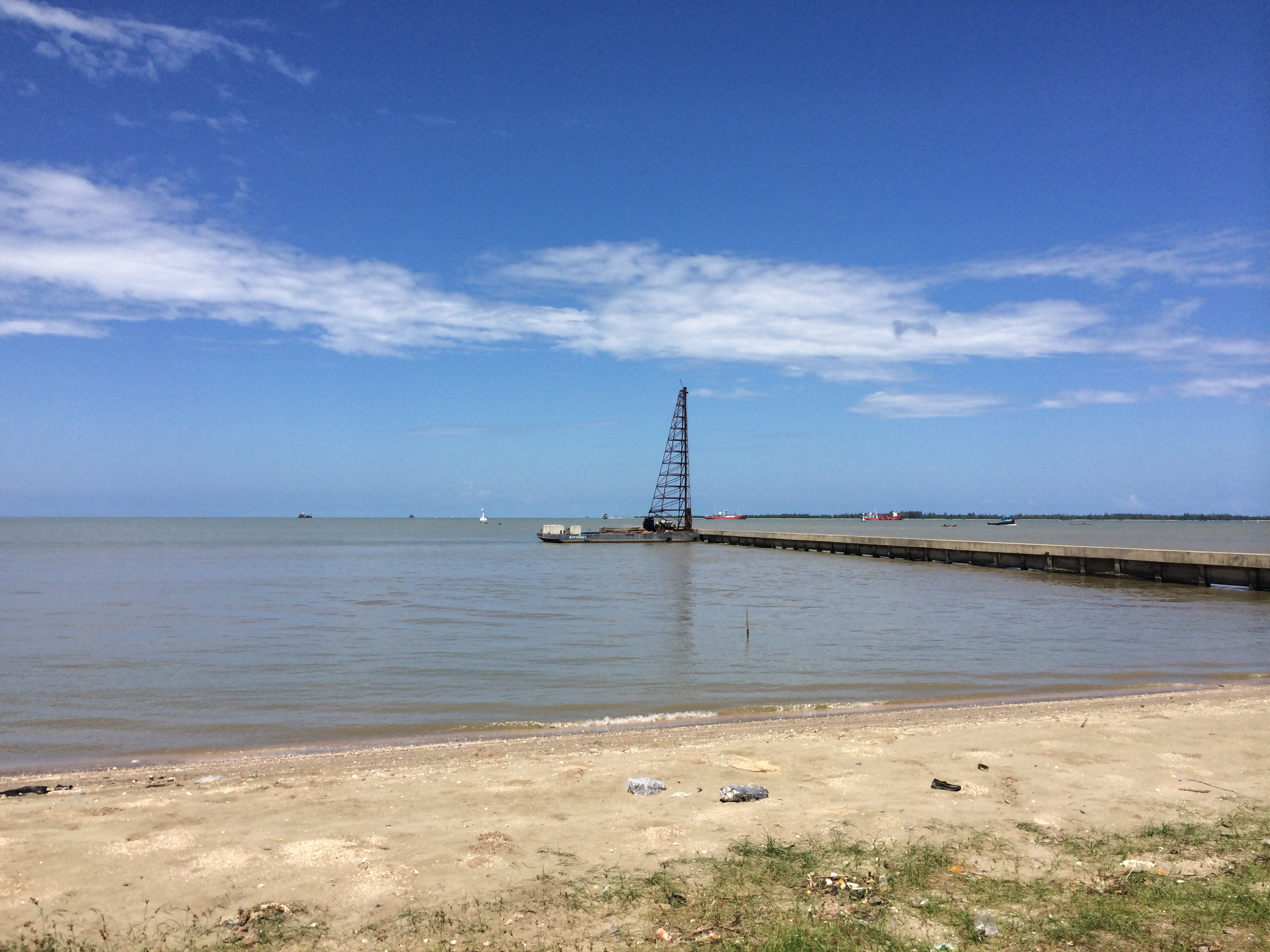 ปากน้ำ จ.ปัตตานี